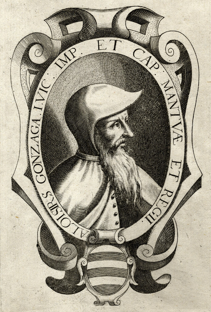 Portrait aus einer Serie von Gonzaga-Portraits, Kupferstich, 17. Jh.; Aloisio